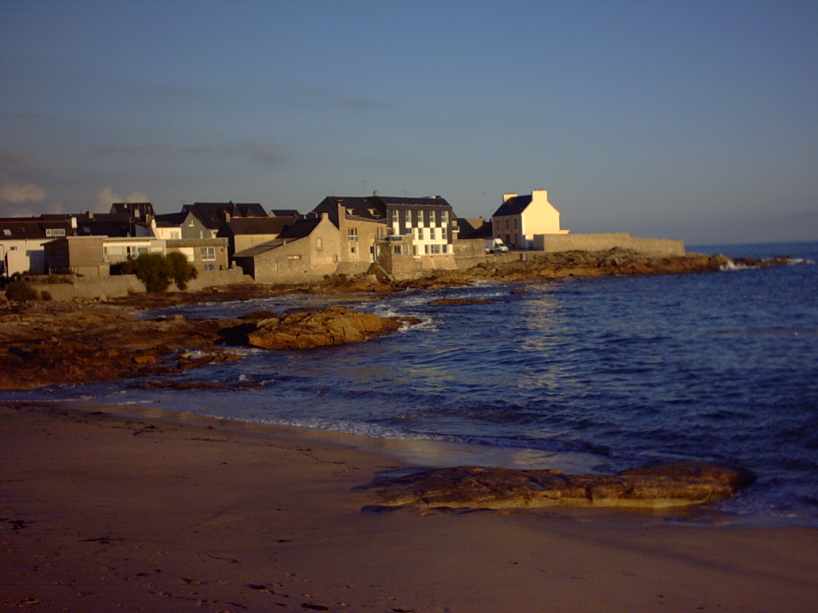 Le bourg de Lomener.